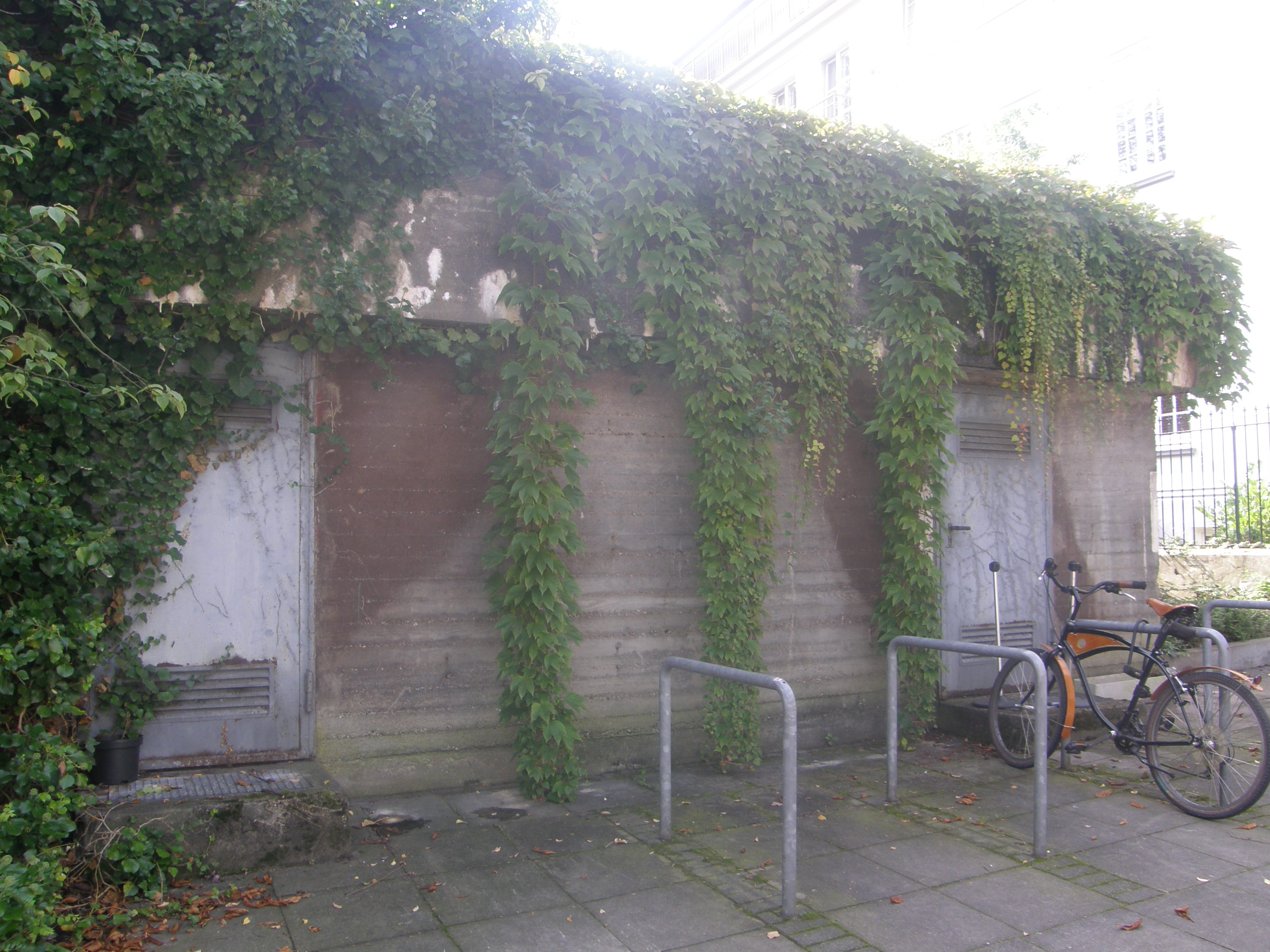 harvestehuder weg hamburg